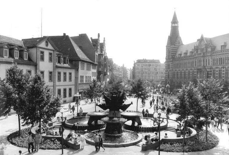 ADN-ZB-Hirndorf-1.10.1987-Erfurt: Der östliche Teil des Angers wird beherrscht durch Hauptpost, Kaufmännerkirche und Warenhaus an der Stirnseite. Einen Ruhepunkt der Hauptgeschäftsstraße bildet der Brunnen vor dem Zentrum-Warenhaus. (Siehe auch 1987-1001-13, 15 und 16N)